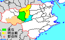 徳島県美馬郡の範囲